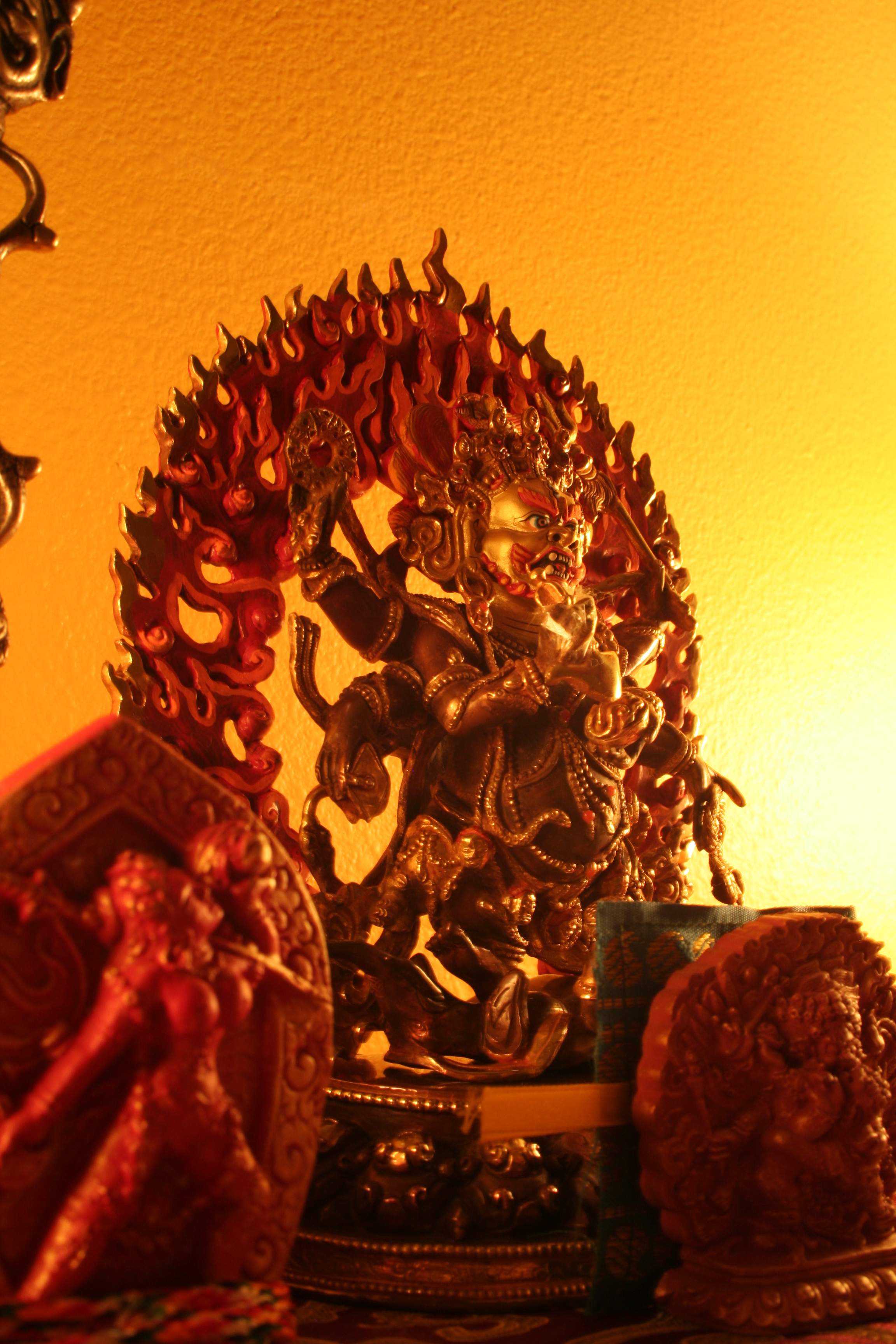 Mahakala rupa - six arm mahakala specifically